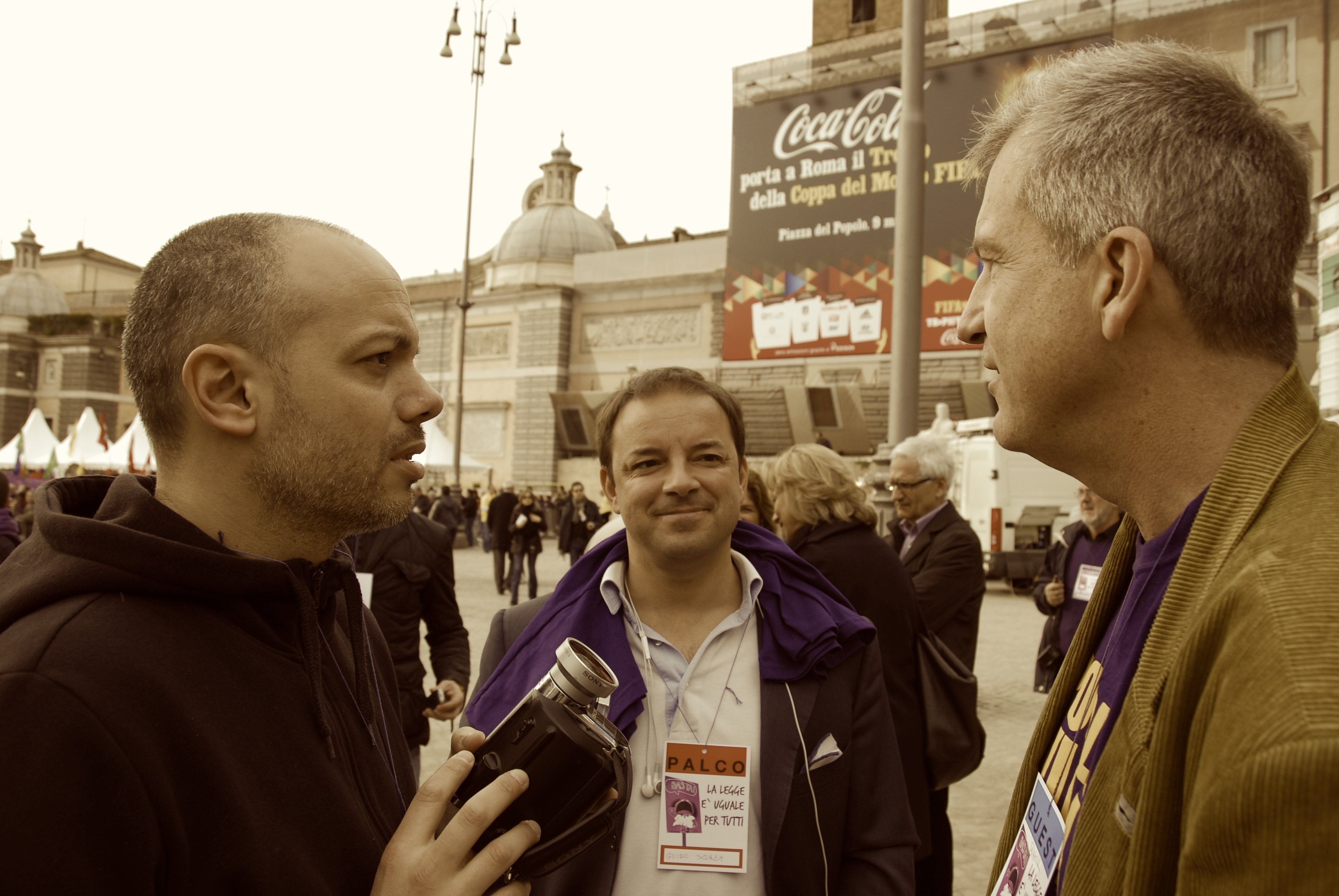 Roma, piazza del Popolo, 27 febbraio 2010. Da sinistra: il conduttore televisivo, attore e regista italiano Diego Bianchi, Guido Scorza e Alessandro Gilioli alla manifestazione "La legge è uguale per tutti" organizzata dal movimento di attivismo politico italiano del Popolo Viola, contro l'istituto giuridico del legittimo impedimento promosso dal governo Berlusconi IV.